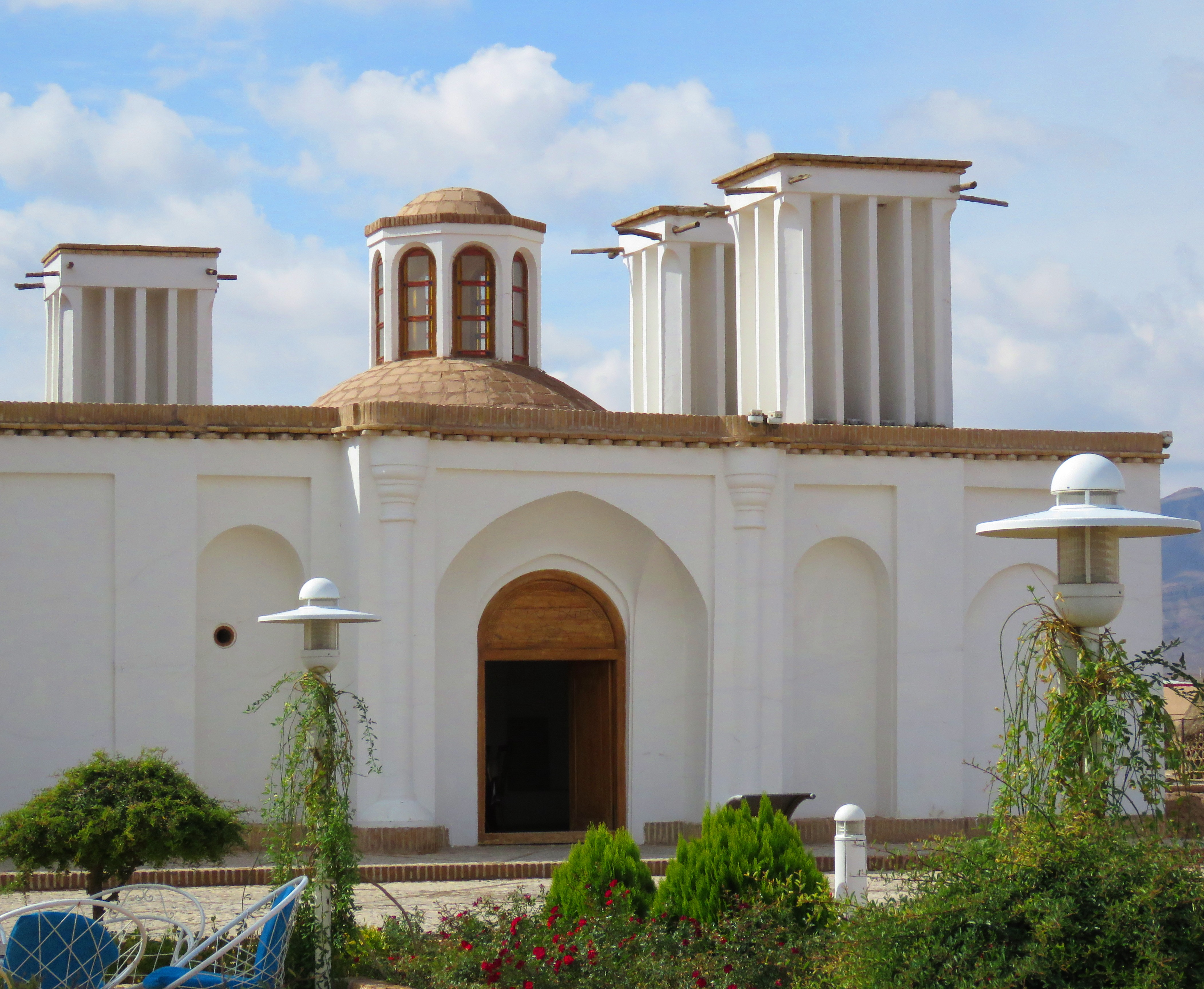 باغ فتح آباد